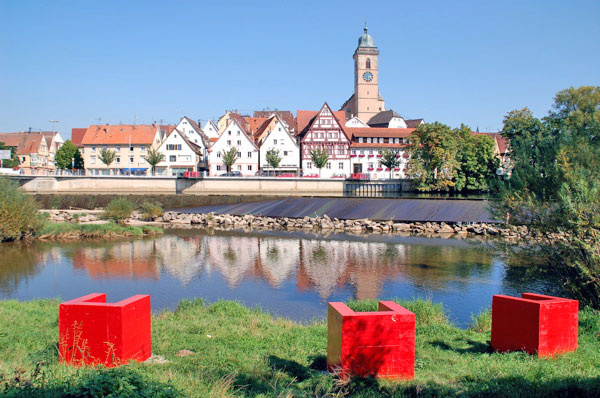 Nuertingen